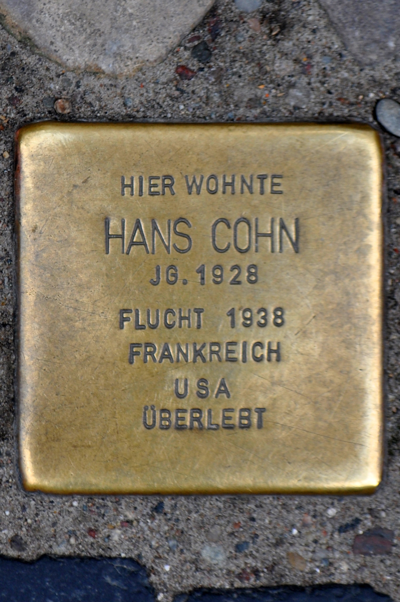 Stolperstein in Stralsund, Ossenreyerstraße 21/22. Der Stolperstein ist einer von fünf Stolpersteinen an dieser Adresse. Text: Hier wohnte Hans Cohn Jg. 1928 Flucht 1938 Frankreich USA überlebt